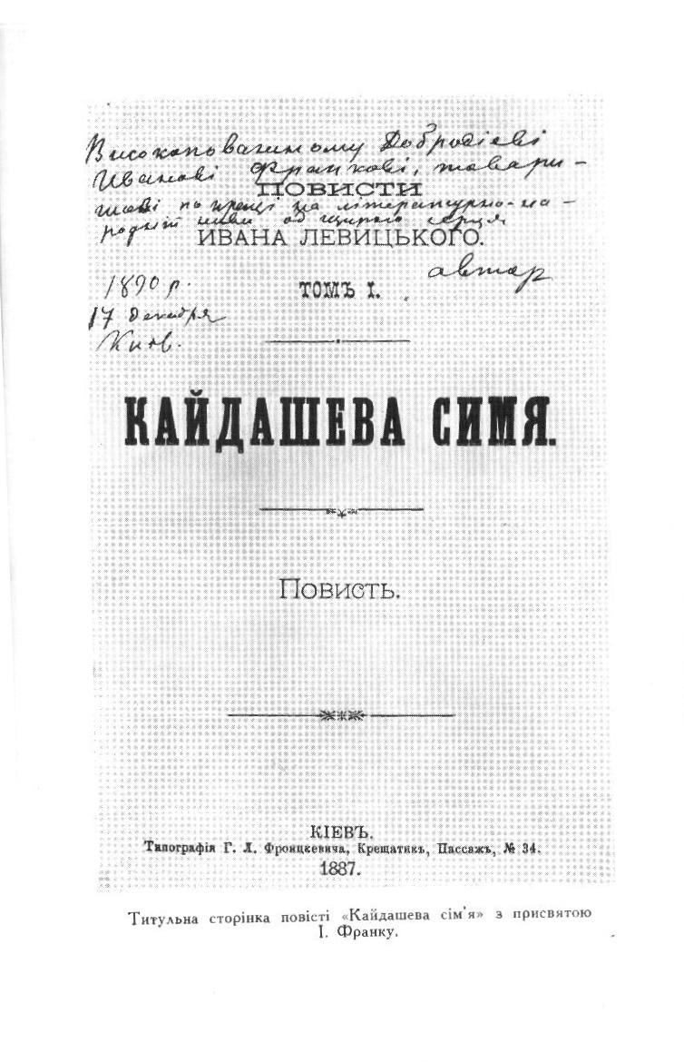 Фото обкладинки книжки І. Нечуя-Левицького "Кайдашева сім'я"